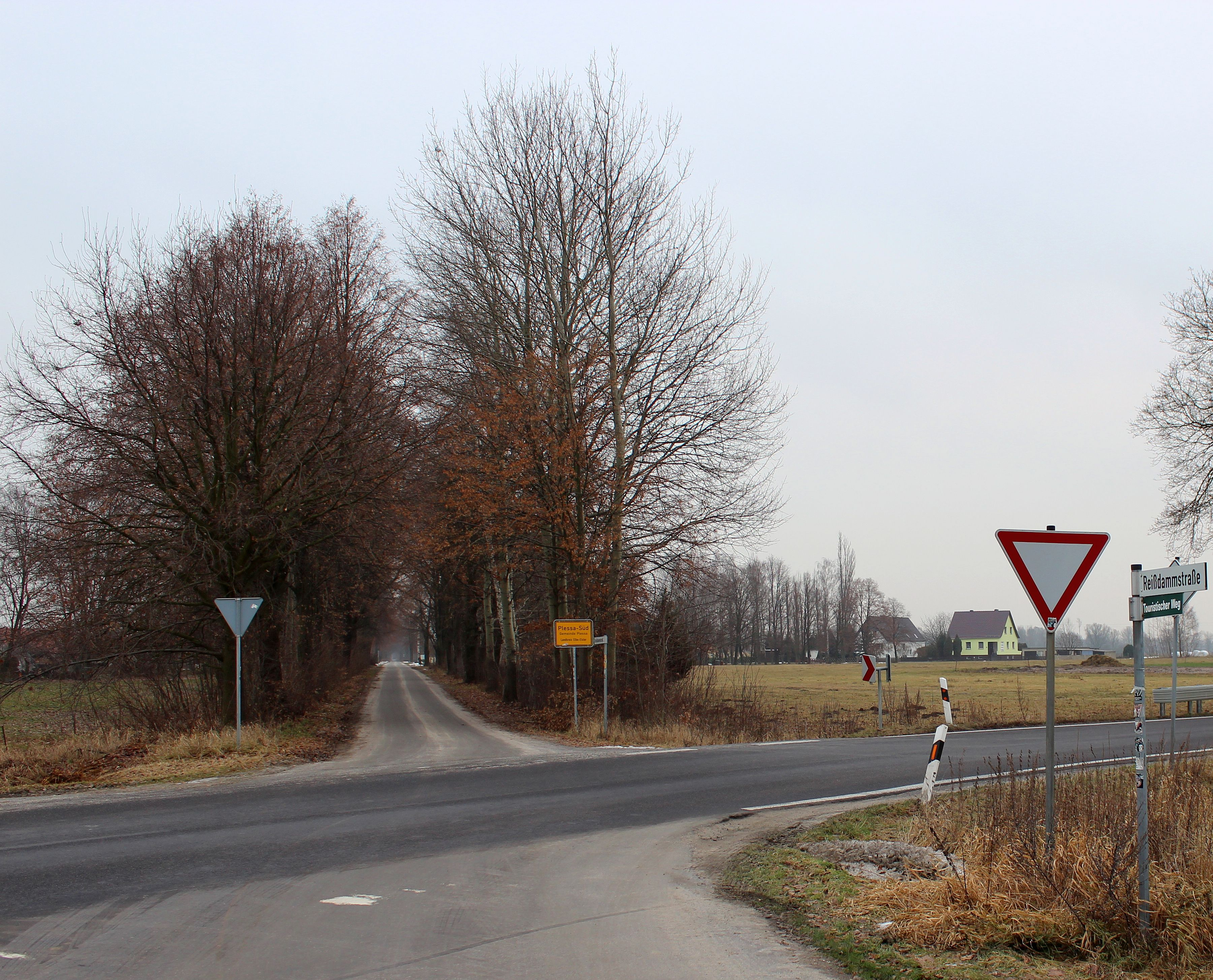 Plessa-Süd.